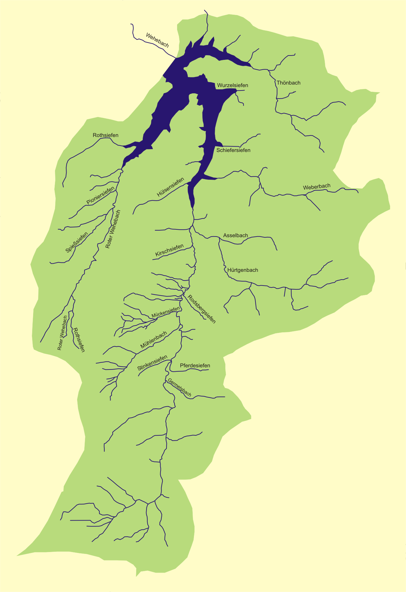 Wassereinzugsgebiet der Wehebachtalsperre